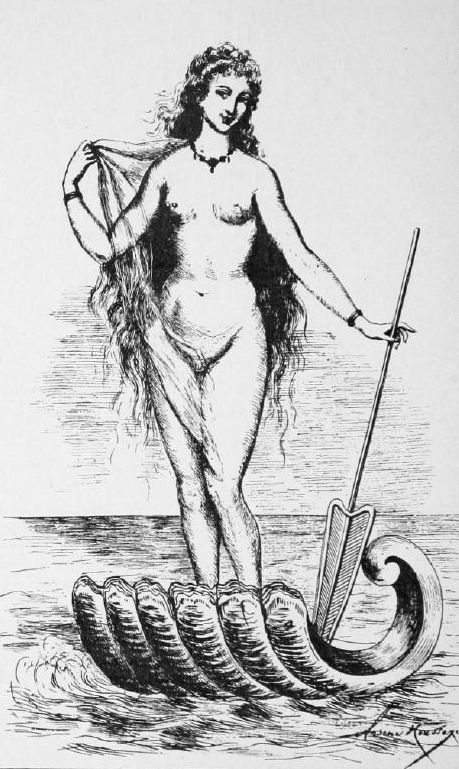 Armande Bejart (?) dans la role de la naiade des Facheux. Portrait a la sanguine.